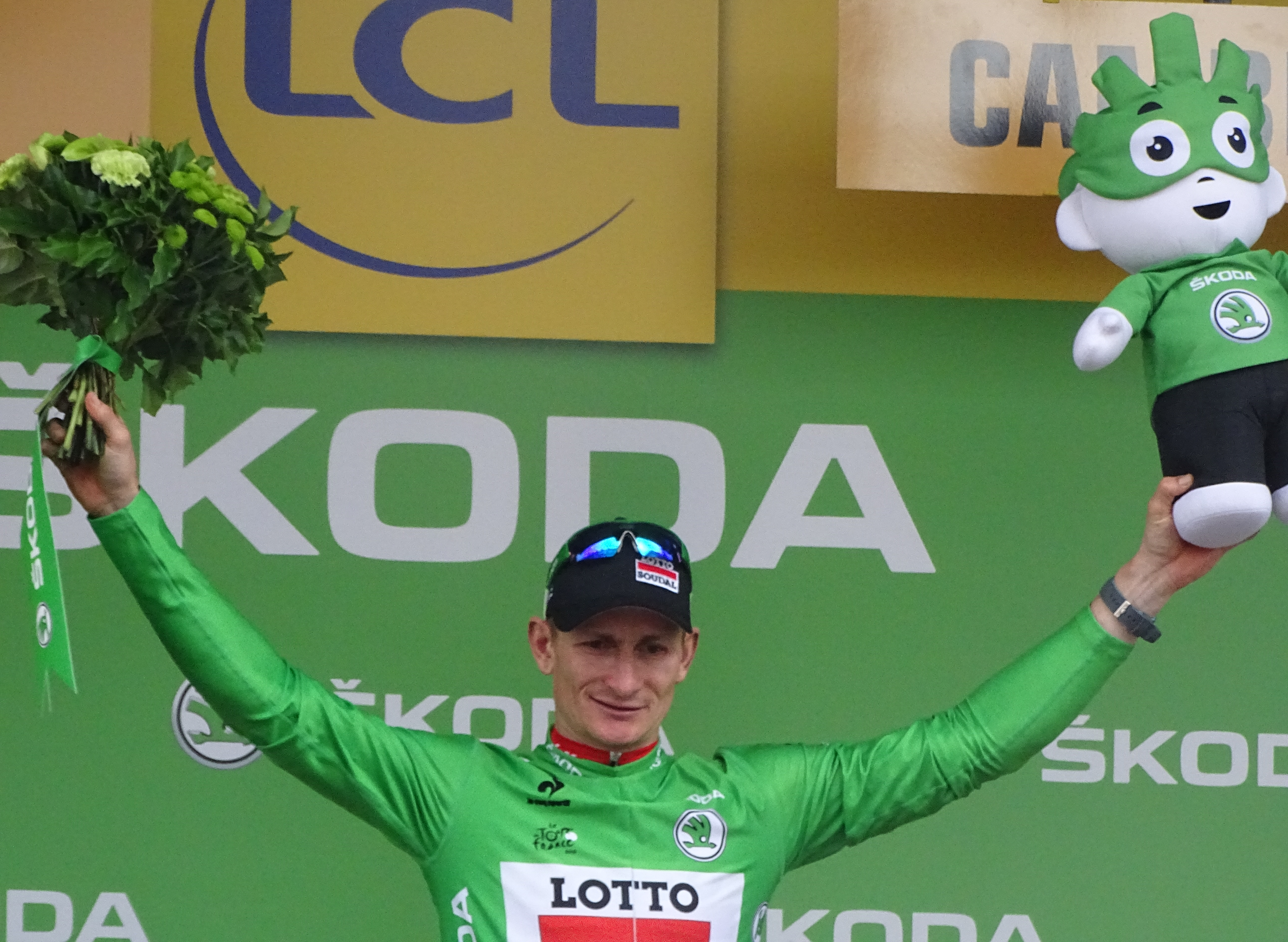 Reportage réalisé le mardi 7 juillet à l'occasion de l'arrivée de la quatrième étape du Tour de France 2015 à Cambrai, Nord-Pas-de-Calais, France.